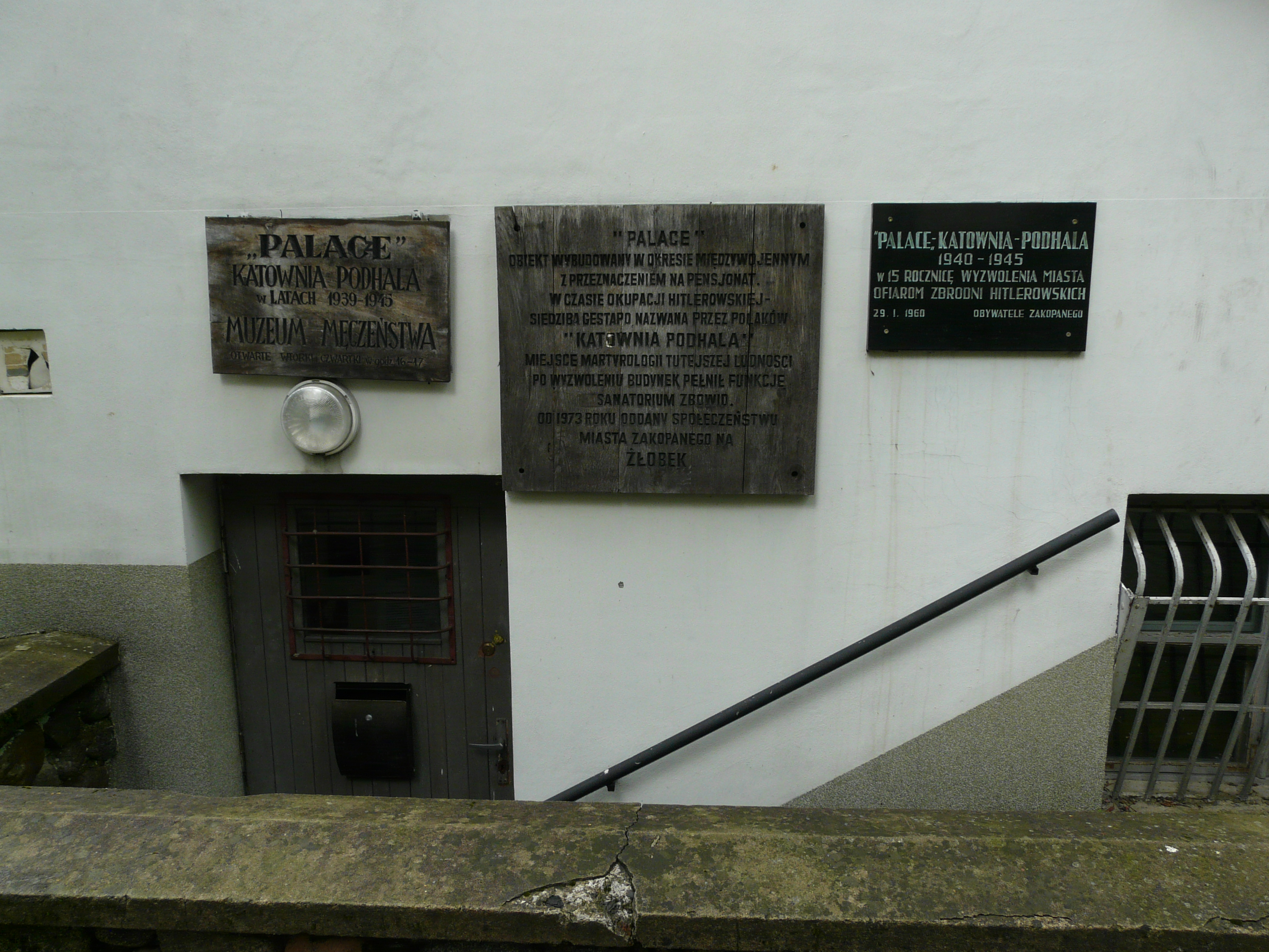 Zakopane